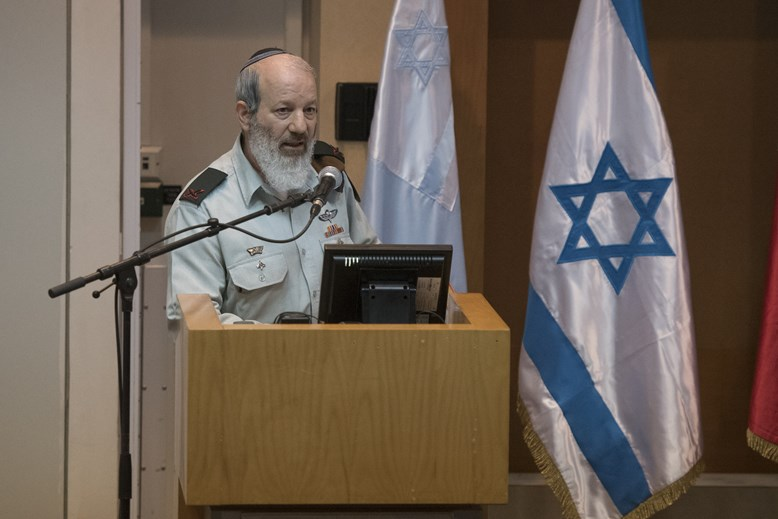 תא"ל הושע בן שלום